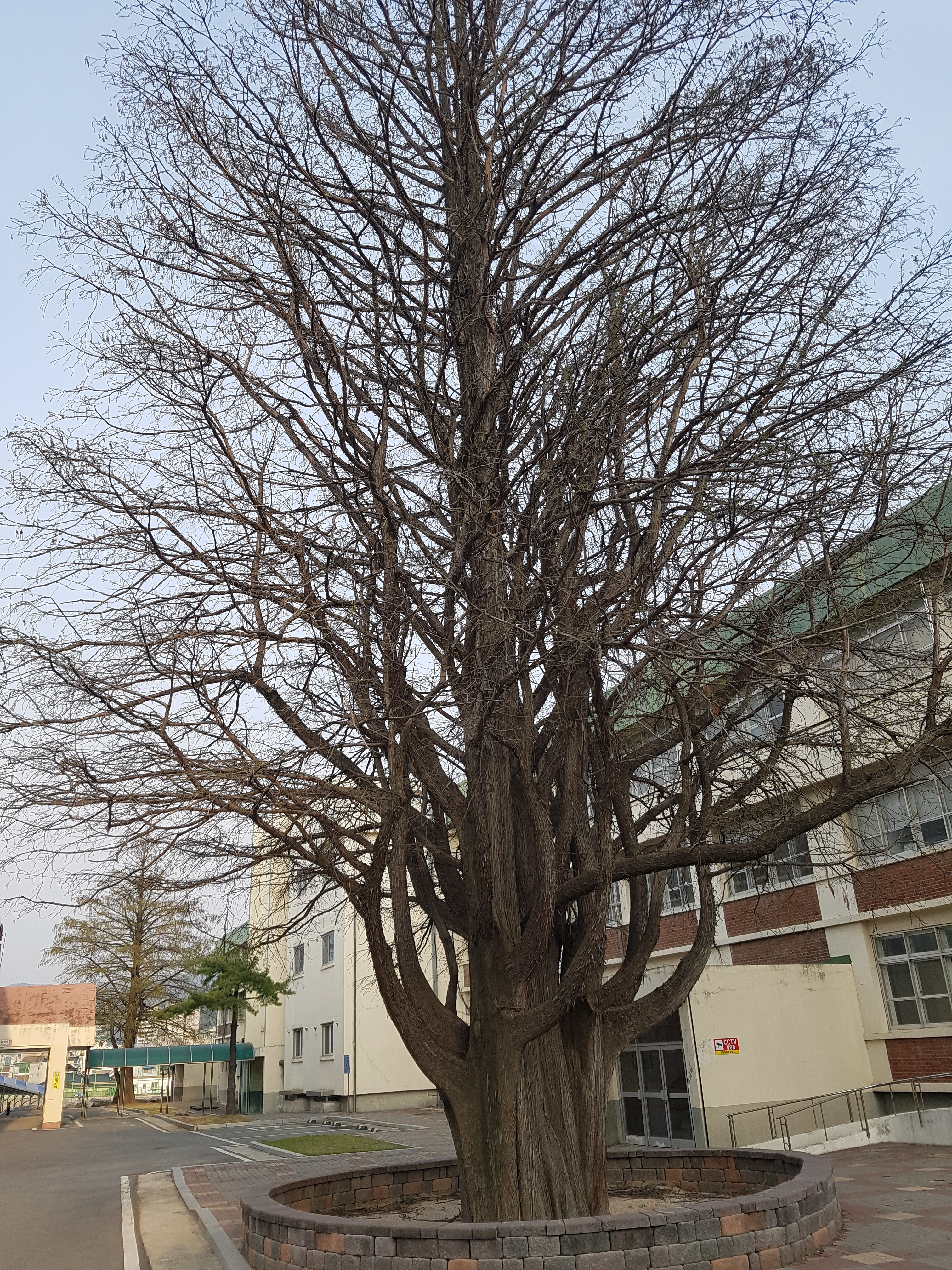 낙우송 , bald cypress